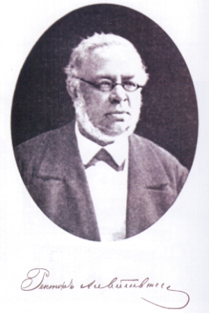 Александр Павлович Матвеев (1816 – 1882) — врач, ординарный профессор, ректор Императорского Киевского университета Св. Владимира, доктор медицины (с 1847), заслуженный ординарный профессор медицины (с 1869), декан медицинского факультета (1862 - 1865), ректор (1865 - 1871, 1875 - 1878) Императорского Киевского университета Св. Владимира